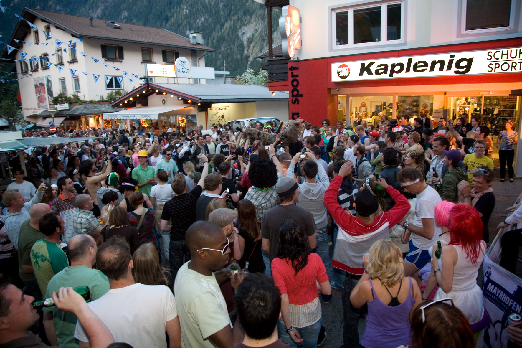 פסטיבל Snowbombing בעיירת הסקי מאיירהופן